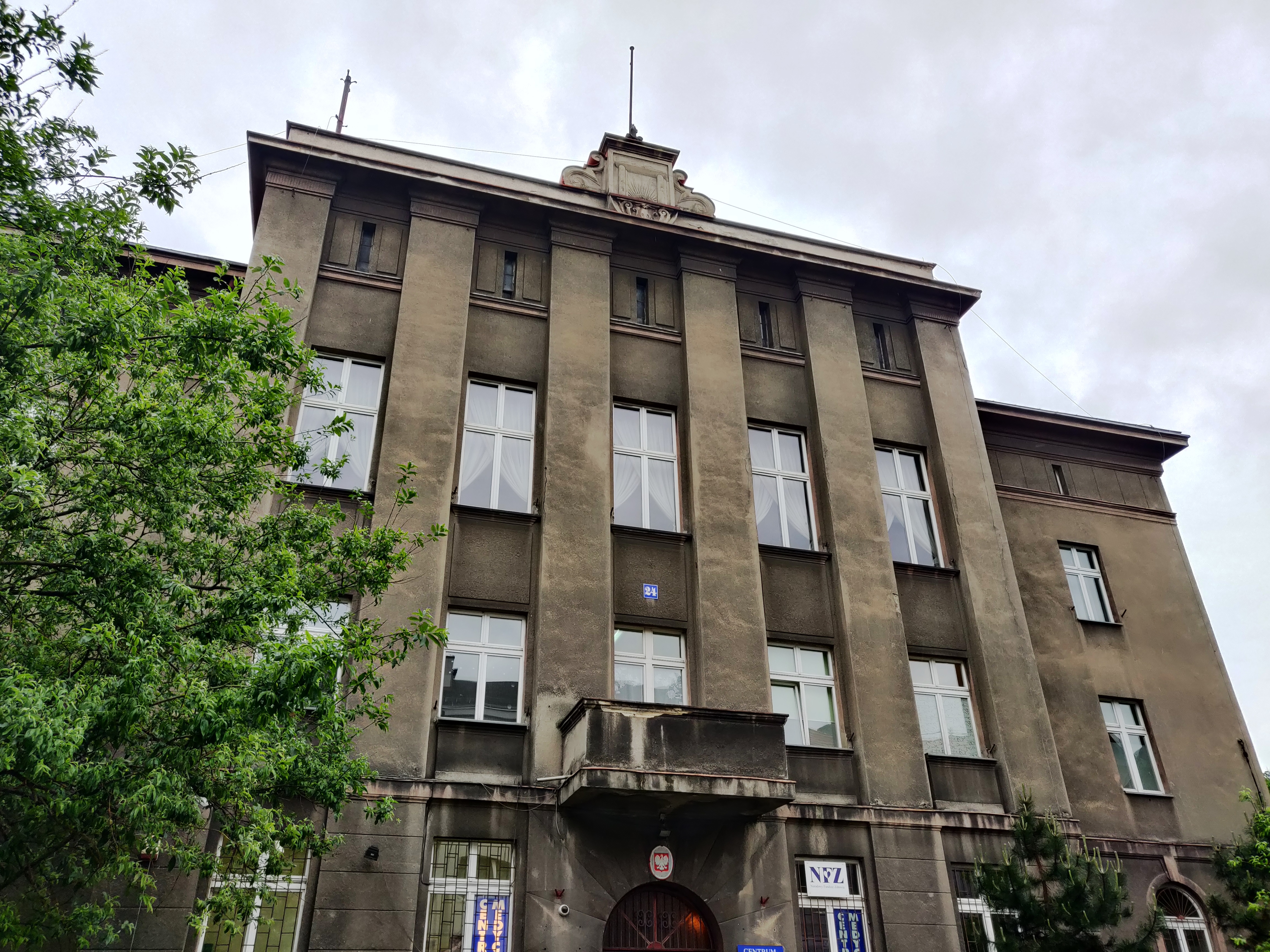 Budynek przy ul. Wiosny Ludów 24 w Katowicach